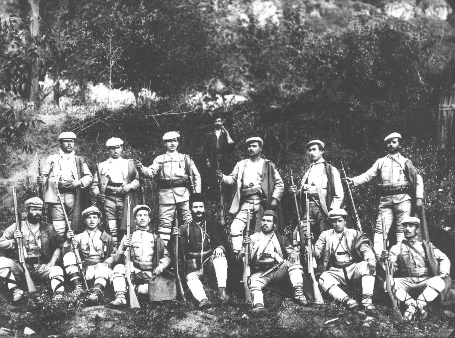 Cheta of IMARO voivoida Georgi Shkornov (nicknamed Dyakon Evstatii), 1903